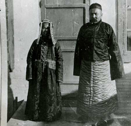 额尔钦巴图，蒙古新巴尔虎左旗人，呼伦贝尔盟长。